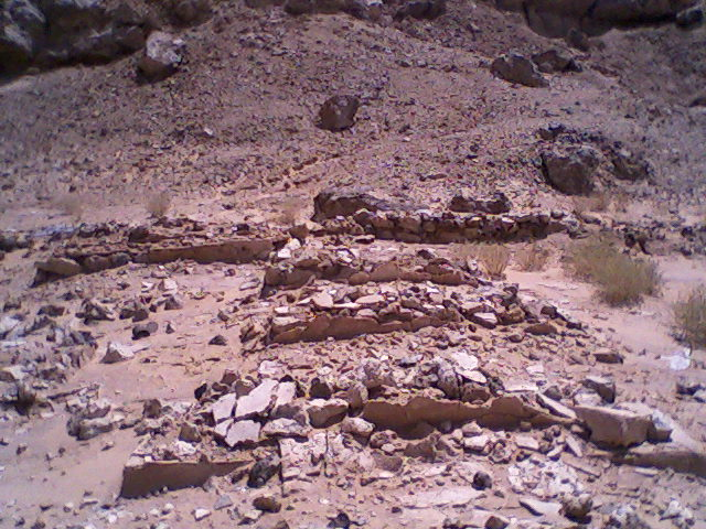 Cimetière des juifs a Béni-Abbés Algérie (les juifs tafilaliens bénéficiant du Décret Crémieux)